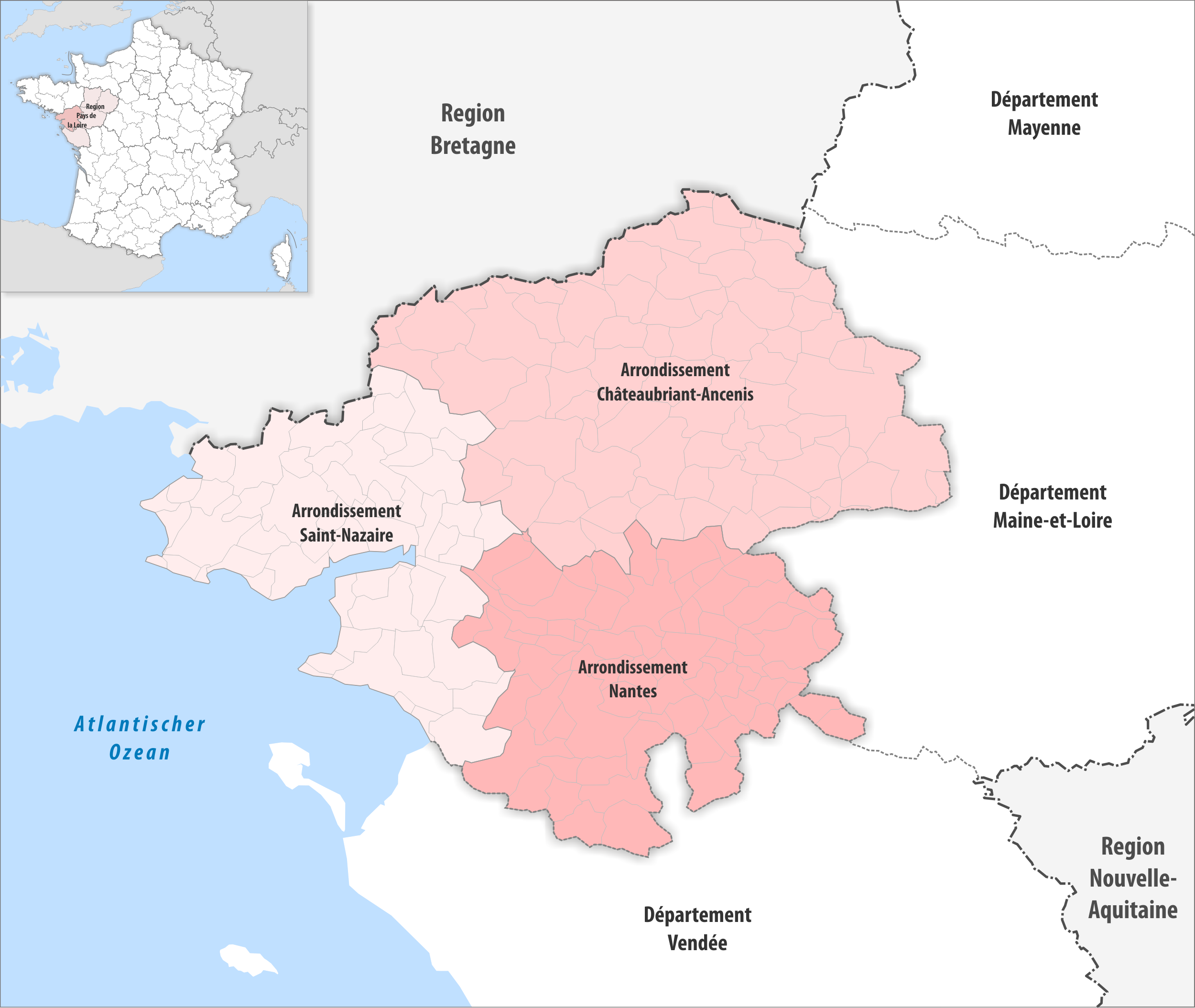 Gemeinden und Arrondissemente im Departement Loire-Atlantique